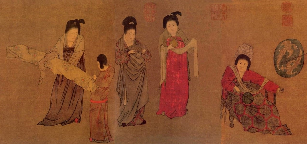 中文（香港）: 揮扇仕女圖（局部）